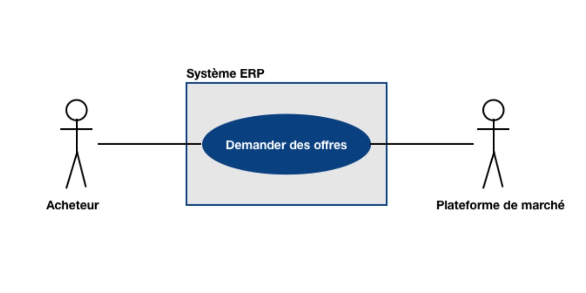 Exemple de diagramme de cas d'utilisation simple